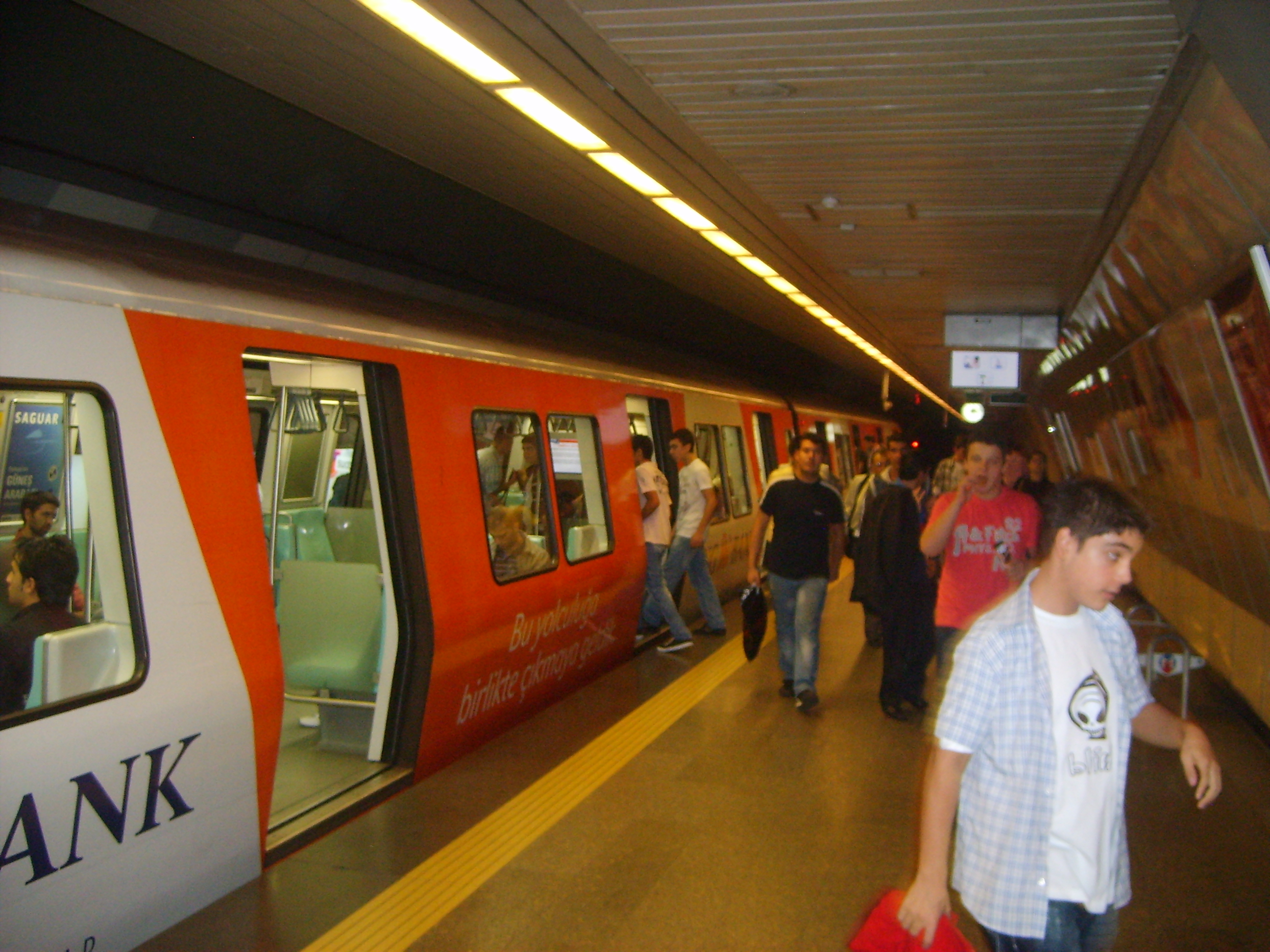 Istanbul Metrosu Taksim istasyonunun iç mekânı